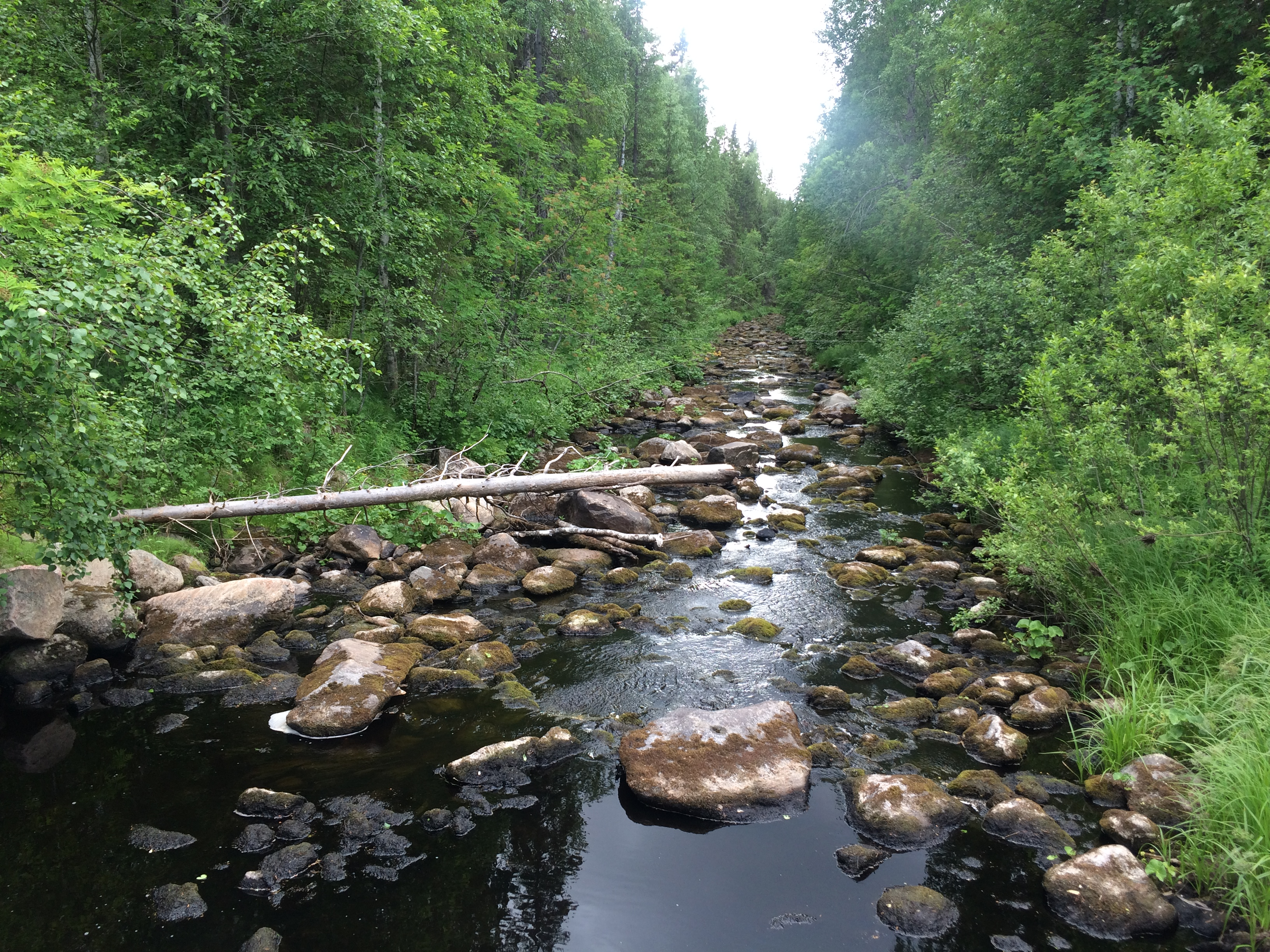 Шигеренджа